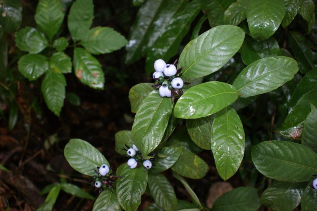 Psychotria florestana - RUBIACEAE Parque Estadual da serra dos Pirineus - Pirenópolis - Goiás - Brasil.